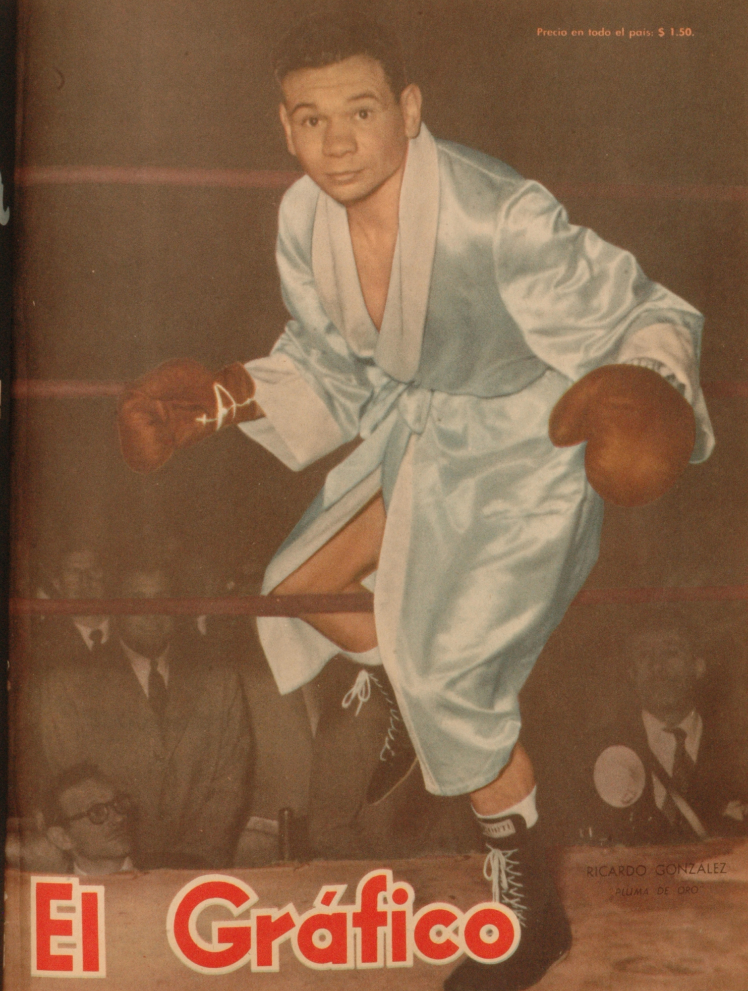 El Grafico del 15 de Julio de 1955. Edicion 1874